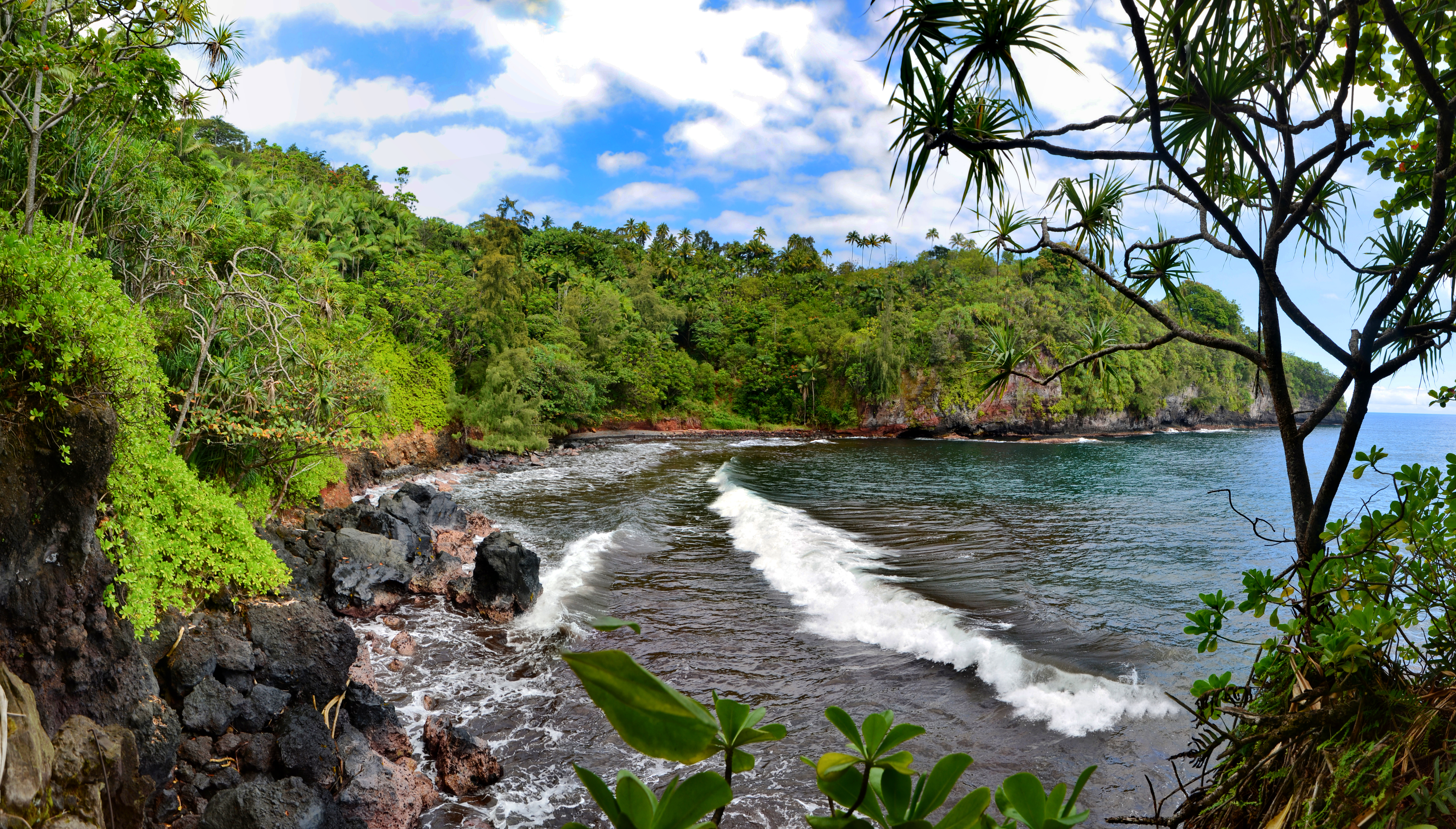 Green Bay, Big Island